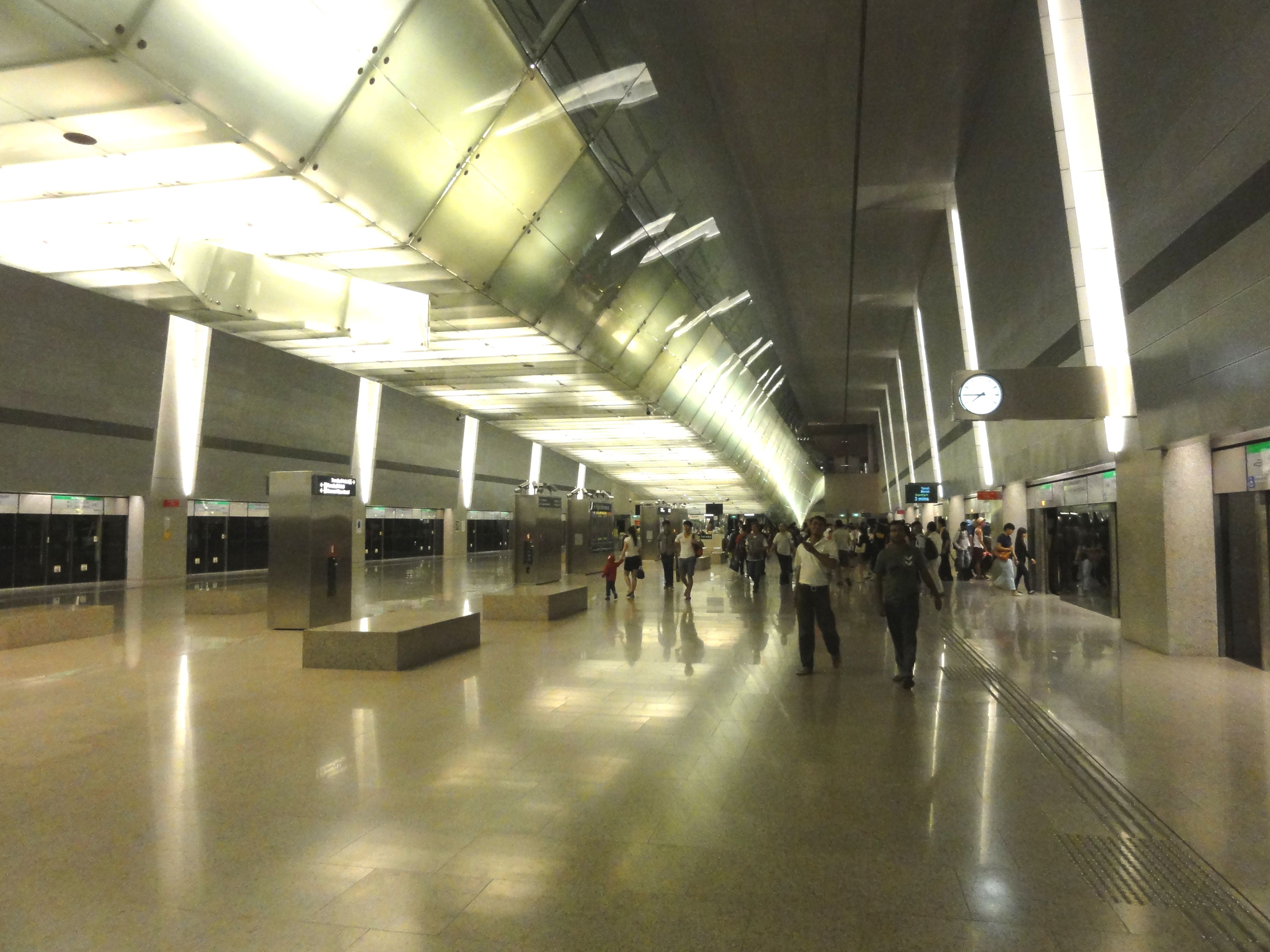 チャンギ・エアポート駅ホーム